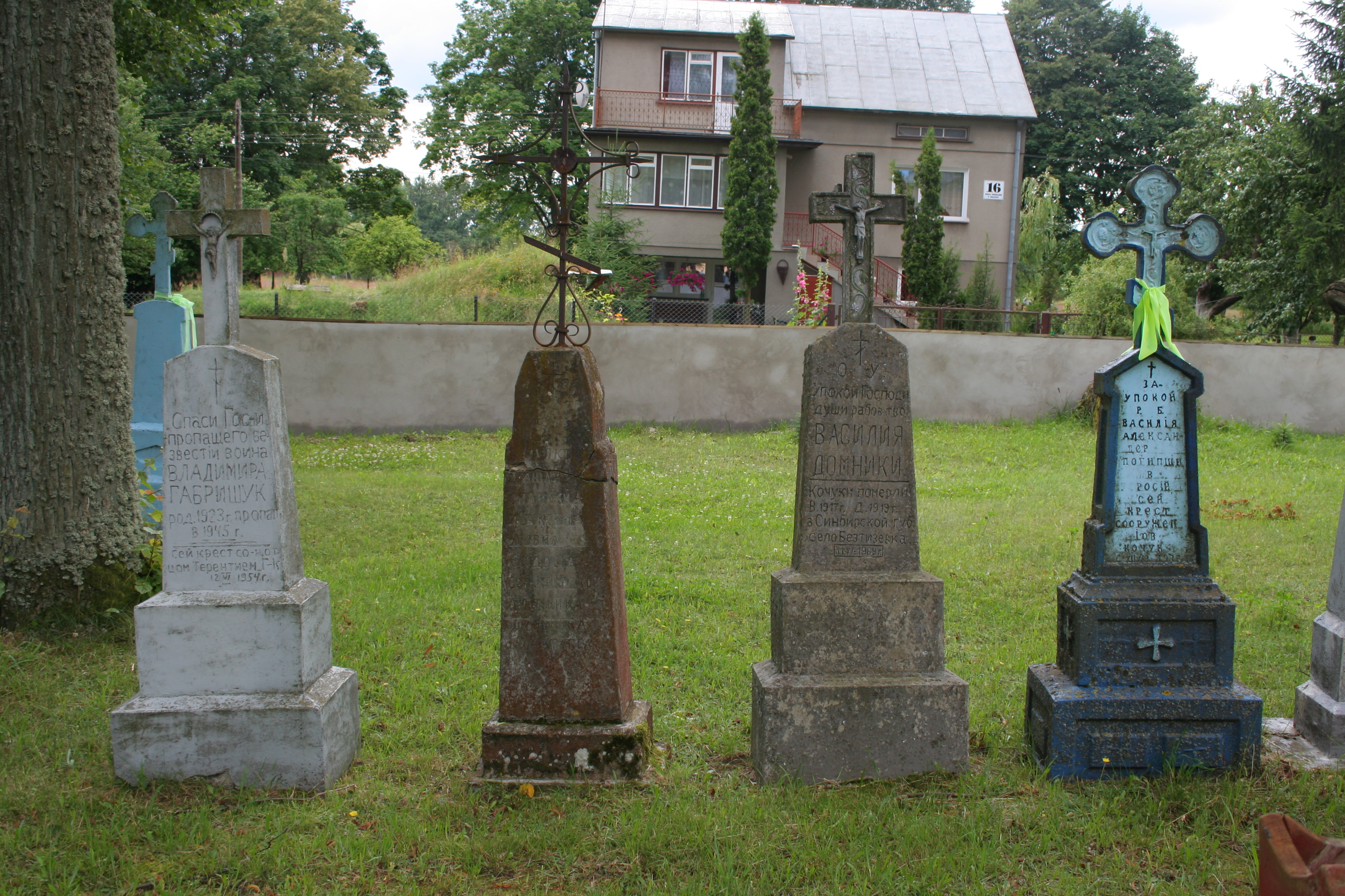 Nagrobki na terenie cerkwi Narodzenia NMP w Rogaczach.